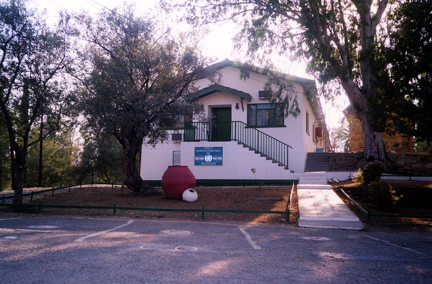 Frente a la plana mayor del contingente argentino en UNFICYP. Skouriotissa. Imagen tomada por el cargador. Año 1998.